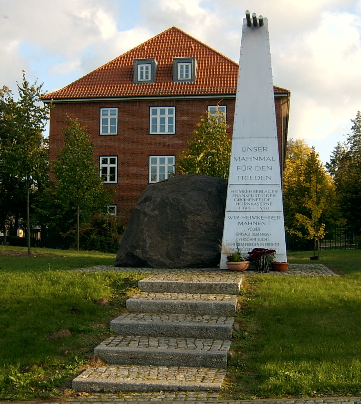 Unser Mahnmal für den Frieden steht in Frankfurt (Oder) vor der Nuhnenstraße 40. In der dortigen ehemaligen Hornkaserne ist heute das Polizeipräsidium untergebracht. Gedacht wird der Heimkehrer welche, nach dem Zweiten Weltkrieg, durch das Lager Gronenfelde zurück nach Deutschland kamen. Siehe Denkmäler in Frankfurt (Oder) sowie Heimkehrerlager Gronenfelde